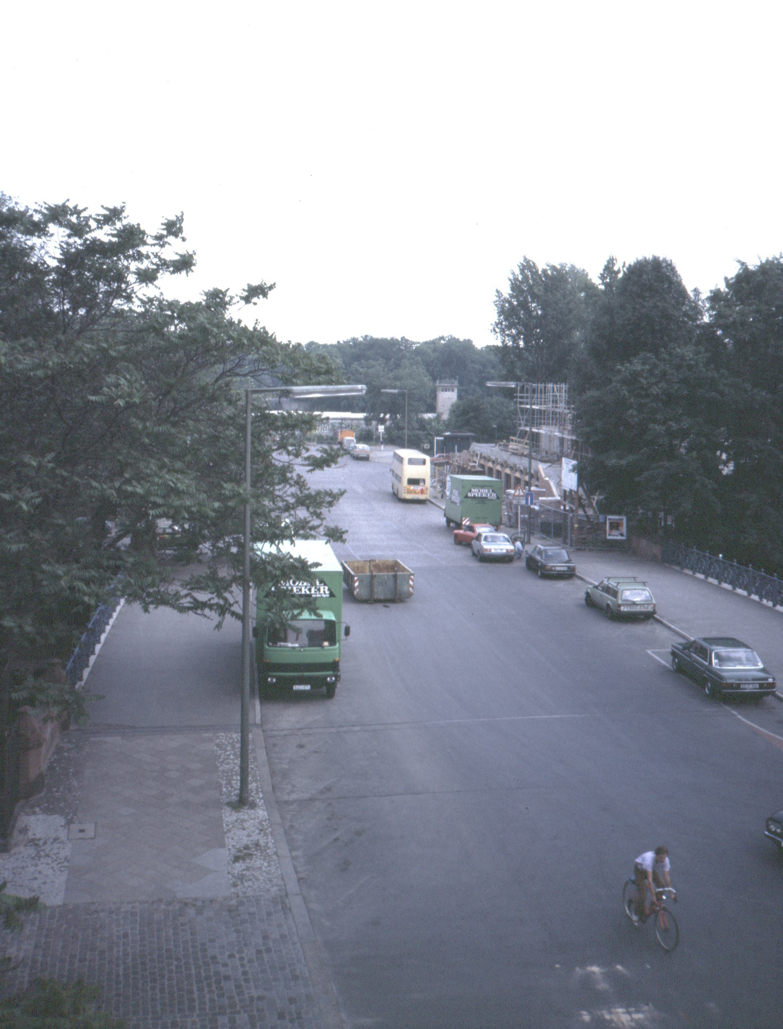 Straße Vor dem Schlesischen Tor Berlin